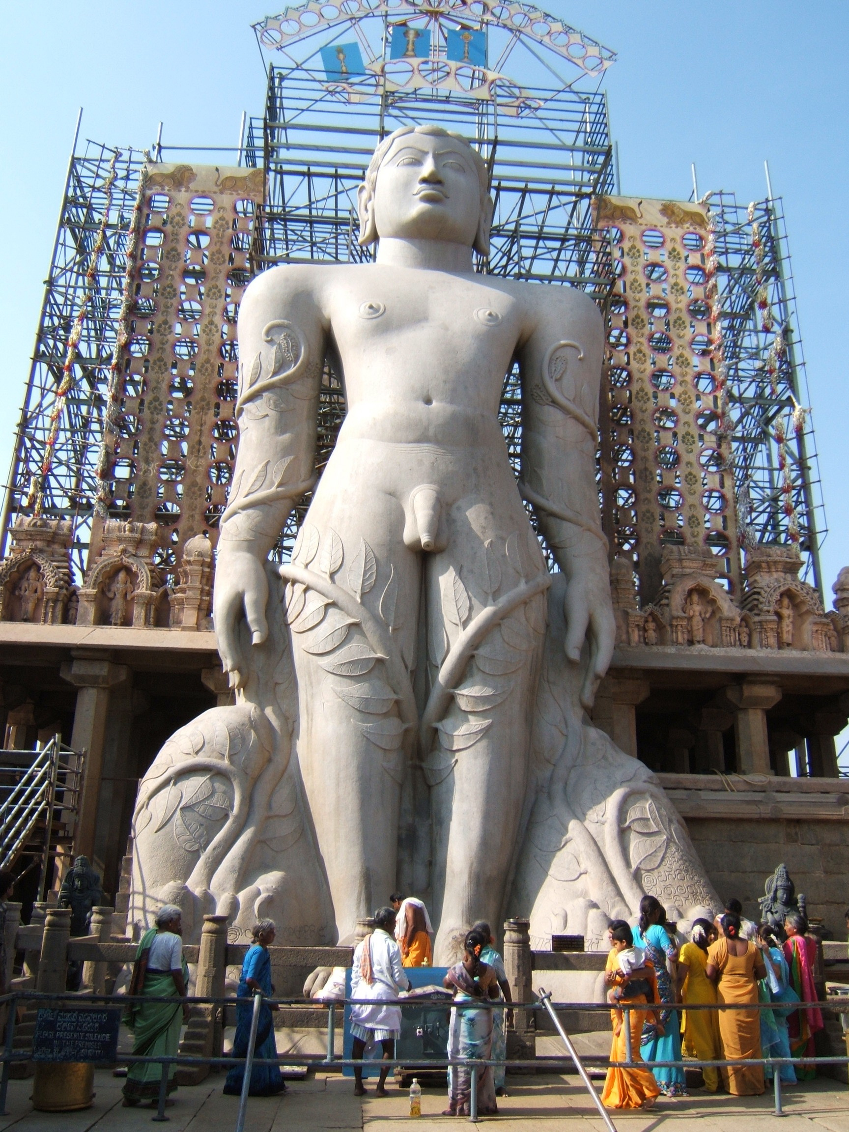 Shravanabelagola, Karnataka, India